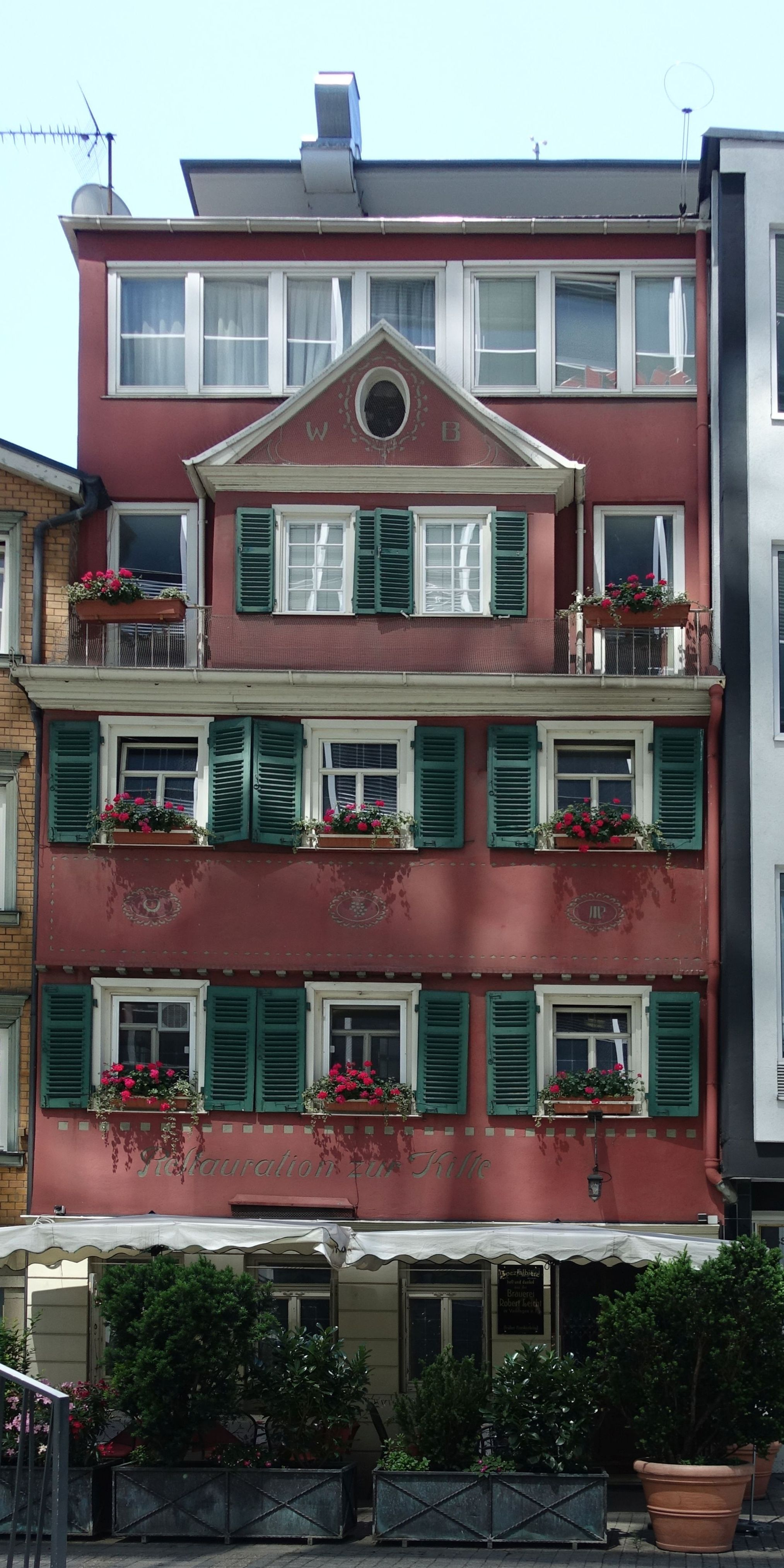 Restauration zur Kiste in Stuttgart, Kanalstraße 2. Links: Schriftstellerhaus.